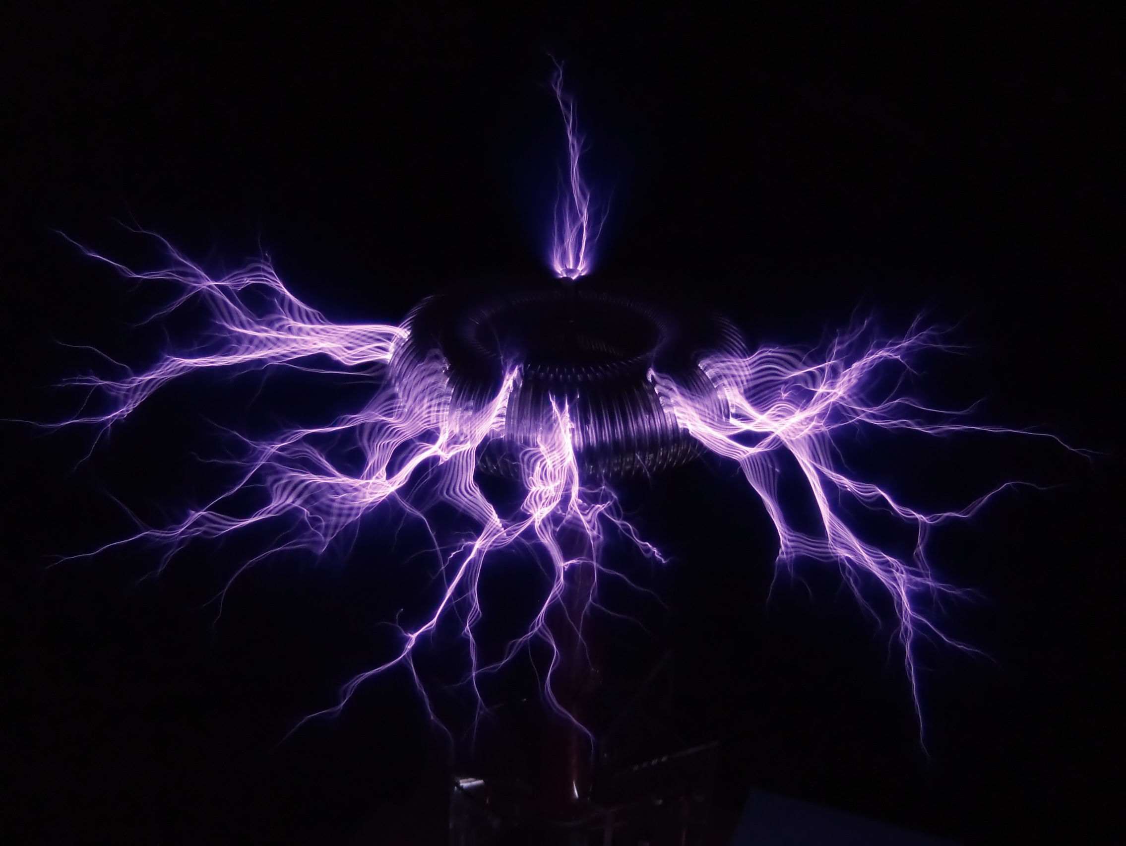 Streamer einer Teslaspule in Betrieb mit einer Resonanzfrequenz von 1Mhz und 600W Eingangsleistung